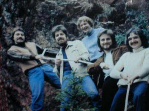 Autogrammkarte Von oom